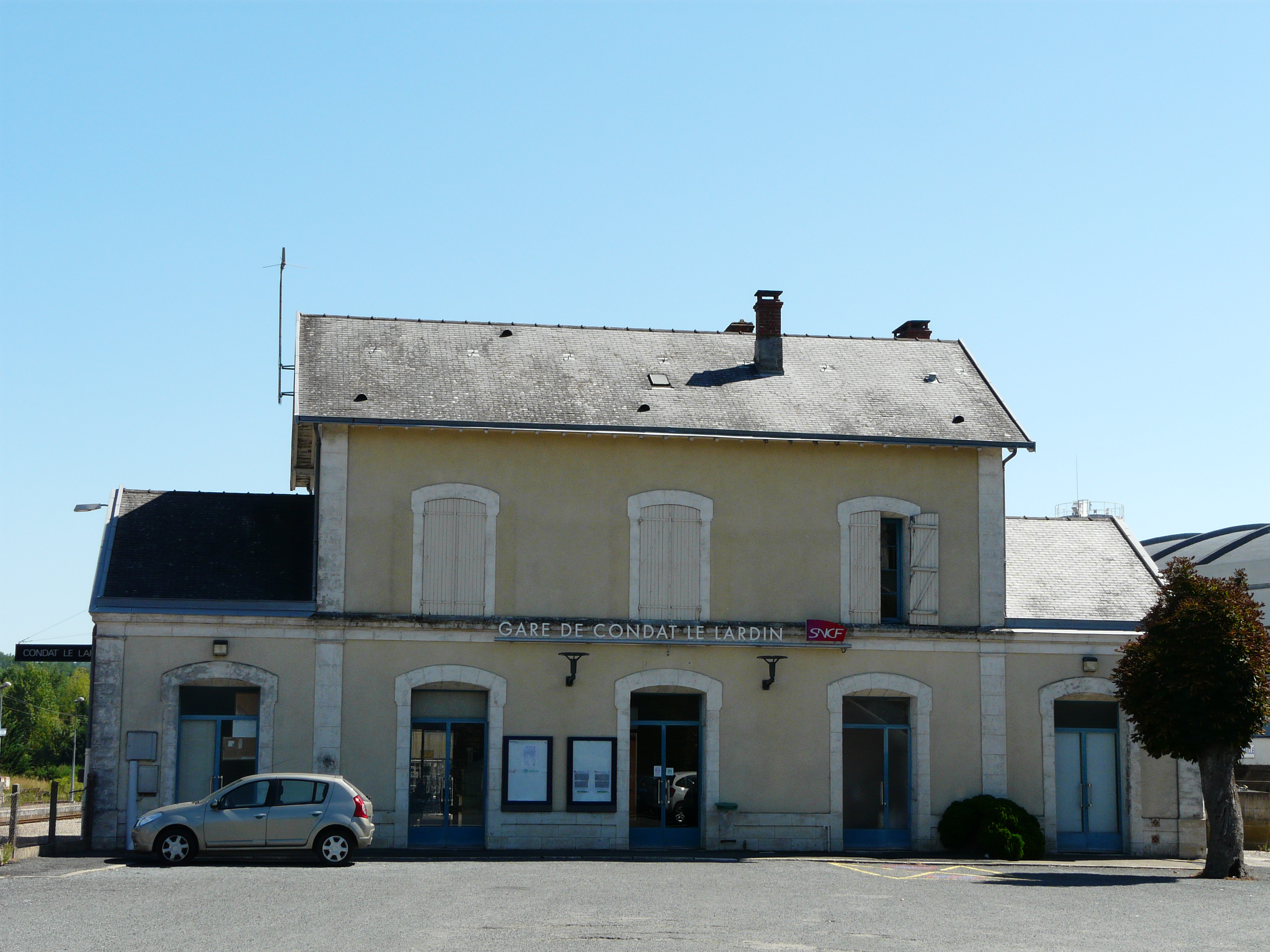 Le bâtiment voyageurs de la gare de Condat - Le Lardin, Le Lardin-Saint-Lazare, Dordogne, France.